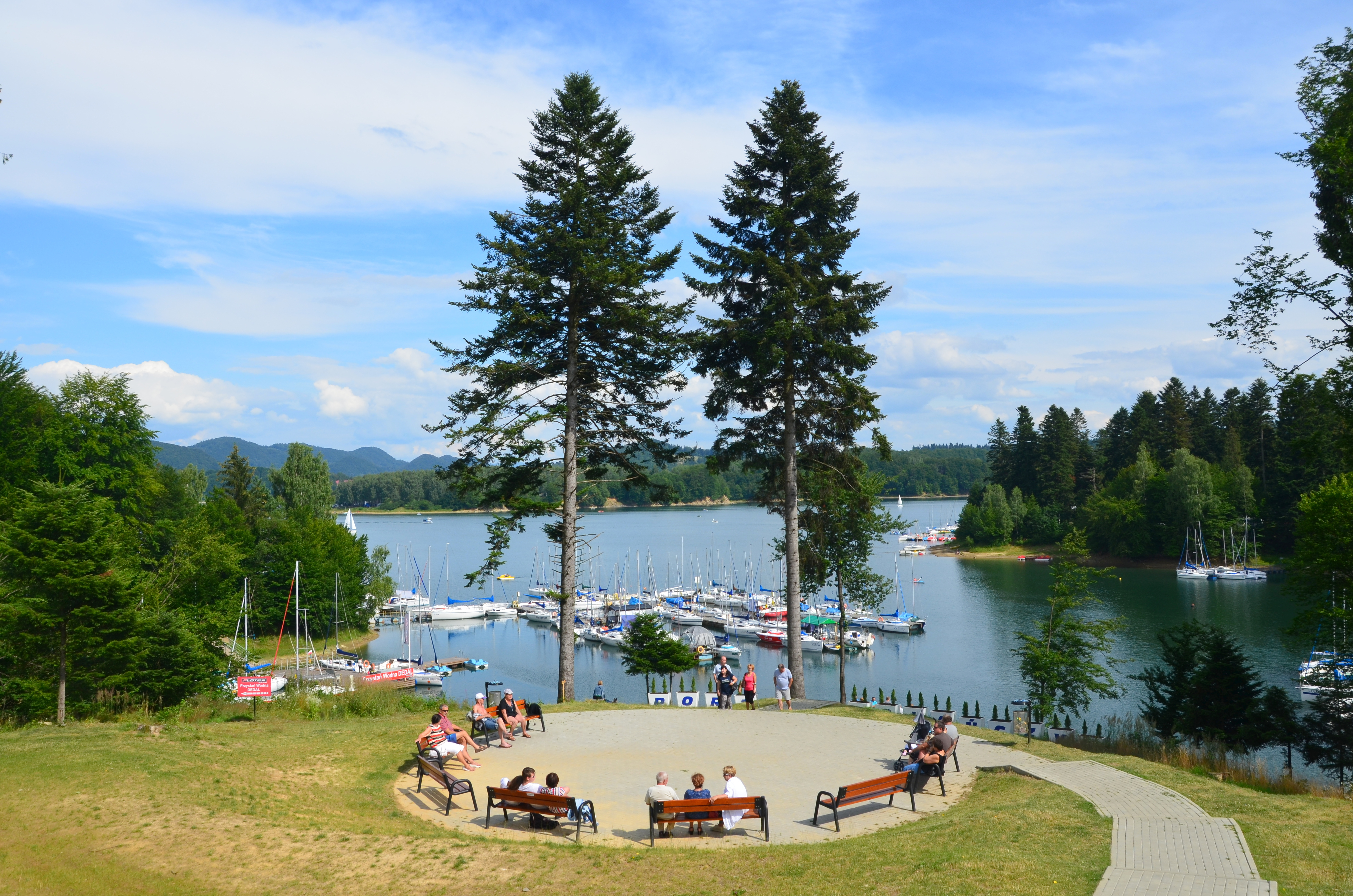 Polanczyk, Solina